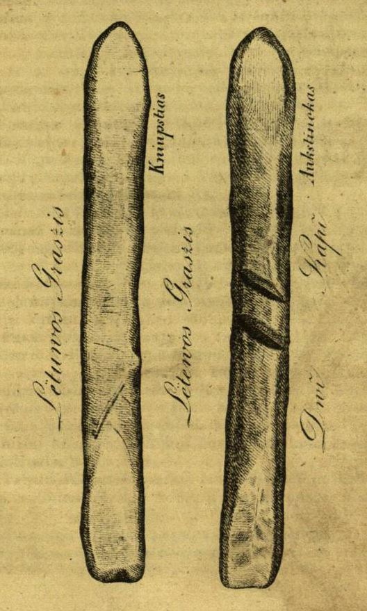 Illustration of Lithuanian long currency from Būdas senovės lietuvių, kalnėnų ir žemaičių published in 1845